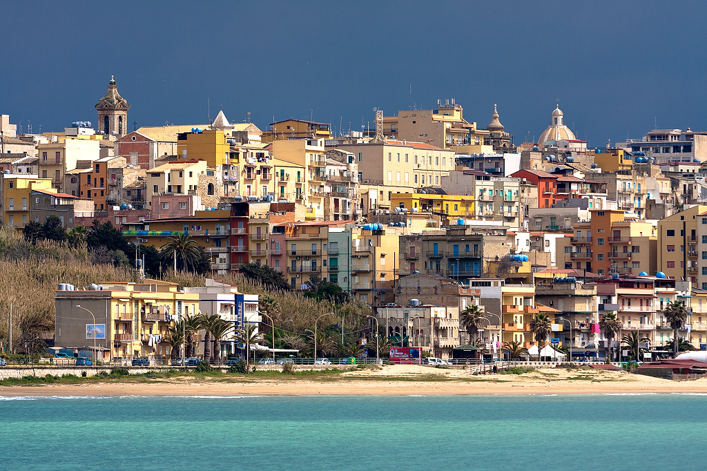 uno scorcio di Gela